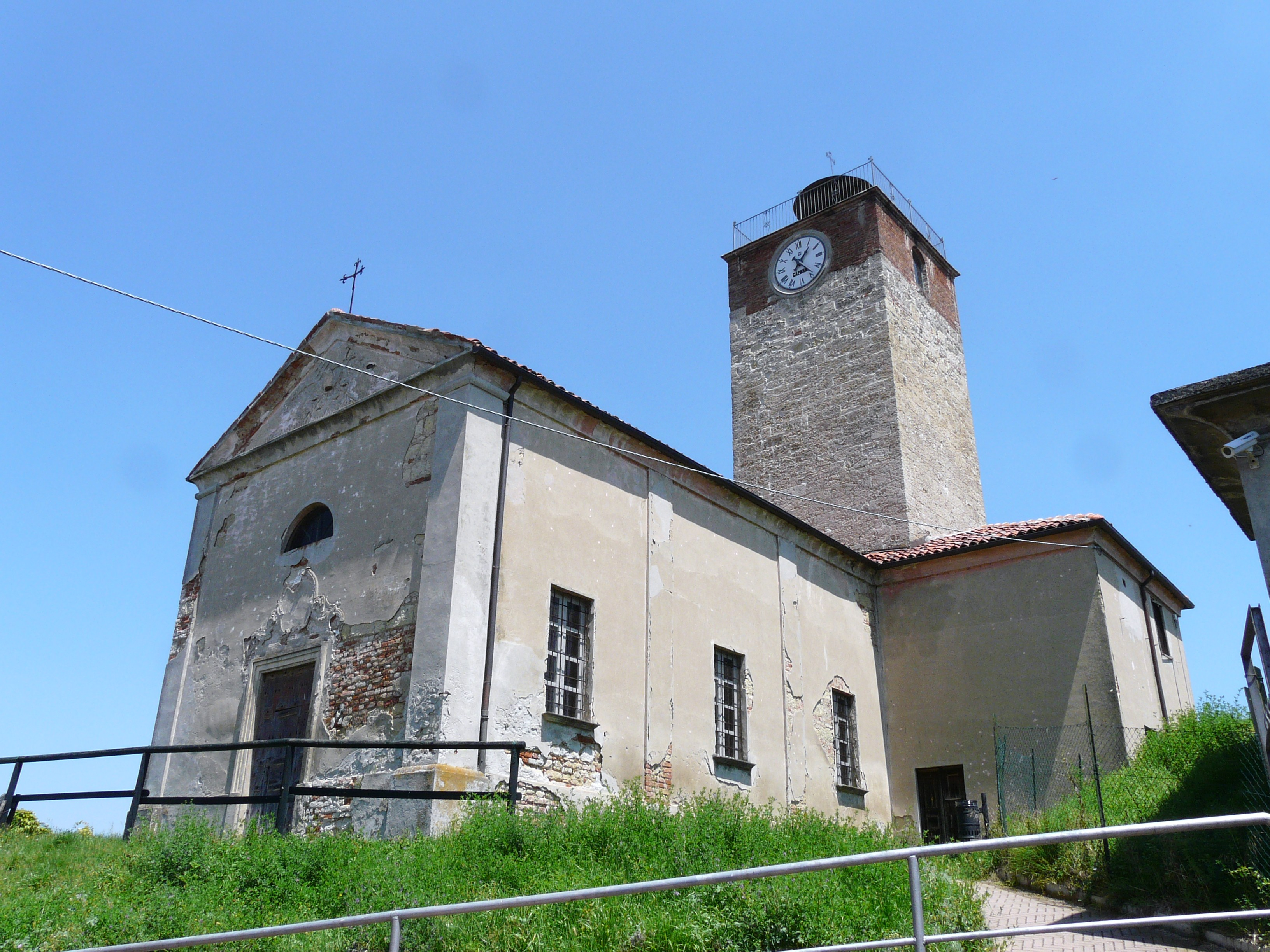 Torre e annessa chiesa, Conzano, Piemonte, Italia